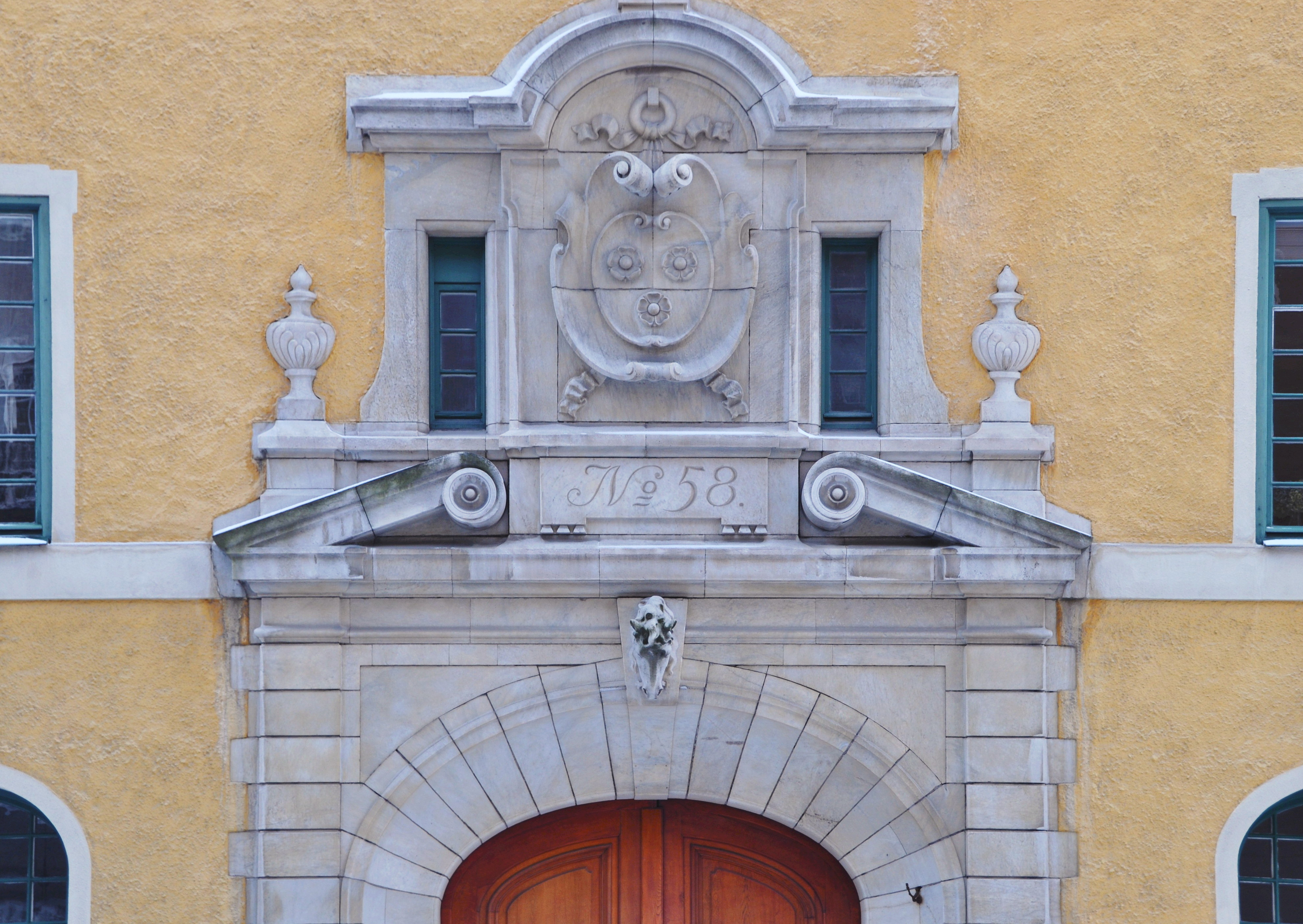 Fasaddetaljer mot mot Storgatan